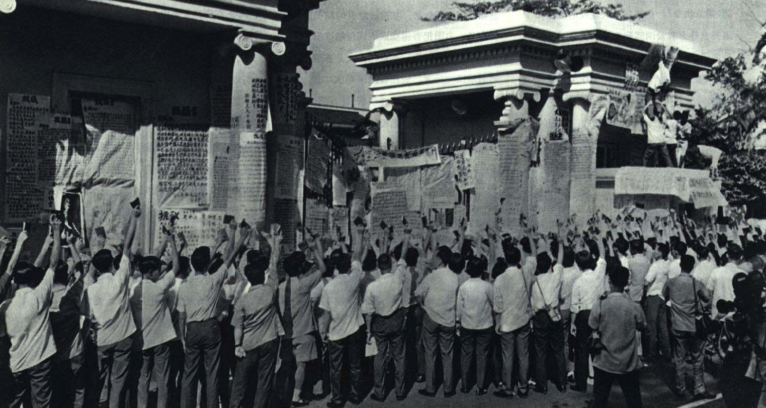 1967-08 1967年 香港电车工人罢工